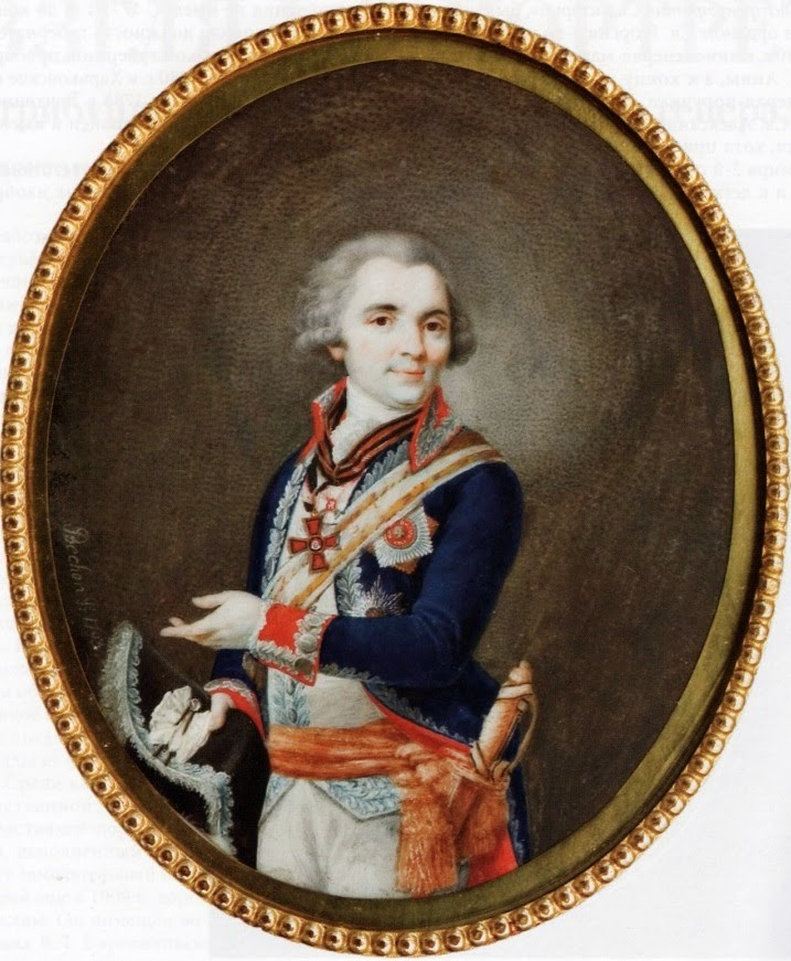 Арсеньев Николай Дмитриевич (1749/1754-1796) – генерал-майор